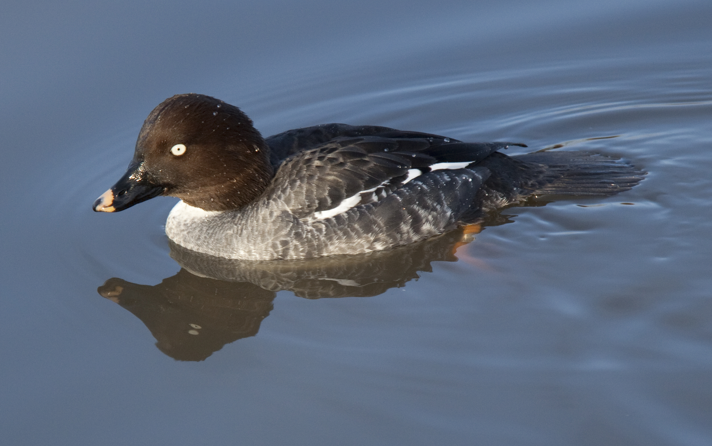 Female Goldeneye 1